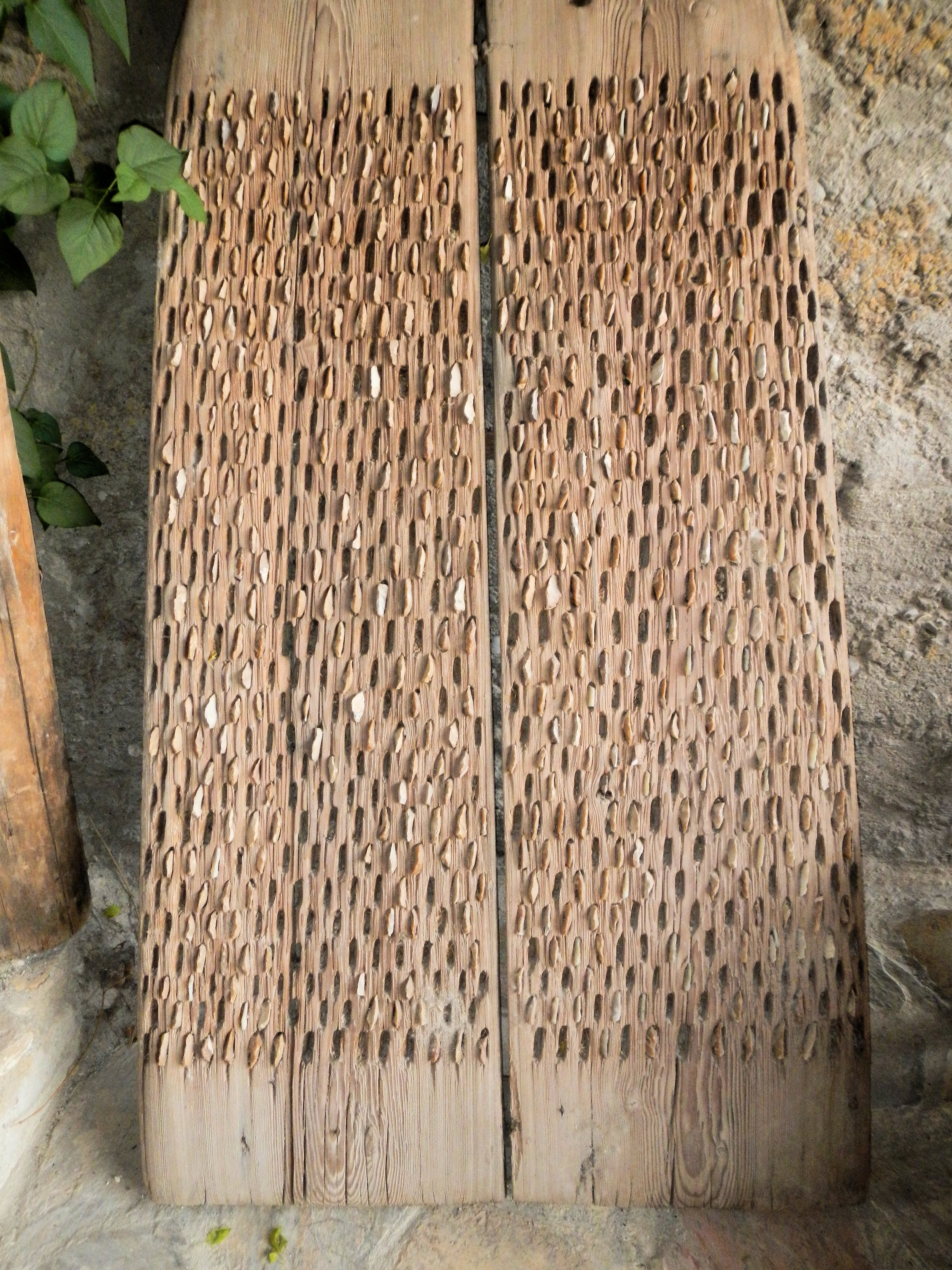 Diente zum Trennen von Korn und Spreu.